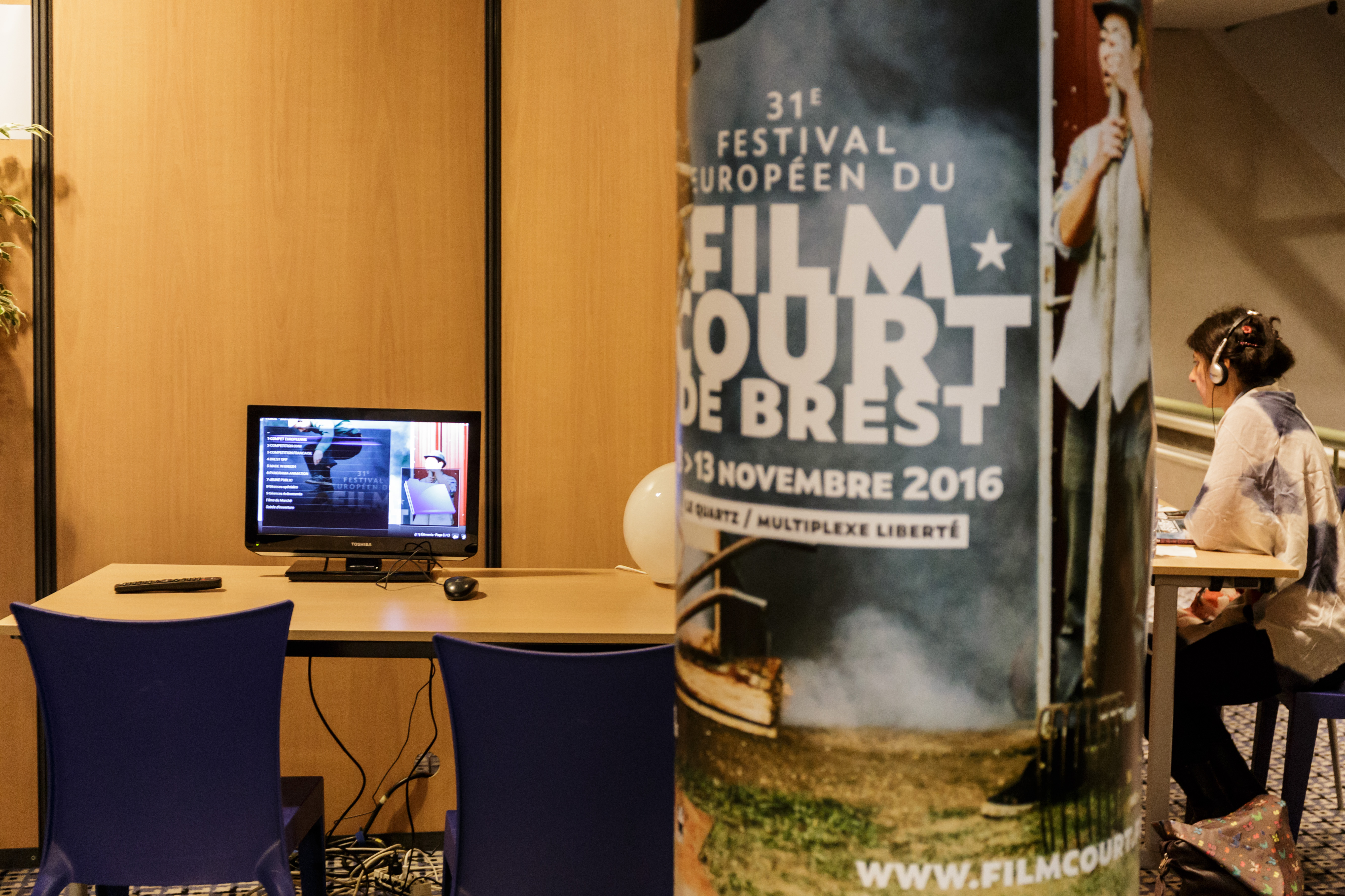 Espaces de visionnage dédiés au "Marché du Film" pour les professionnels lors du Festival européen du film court de Brest en novembre 2016.